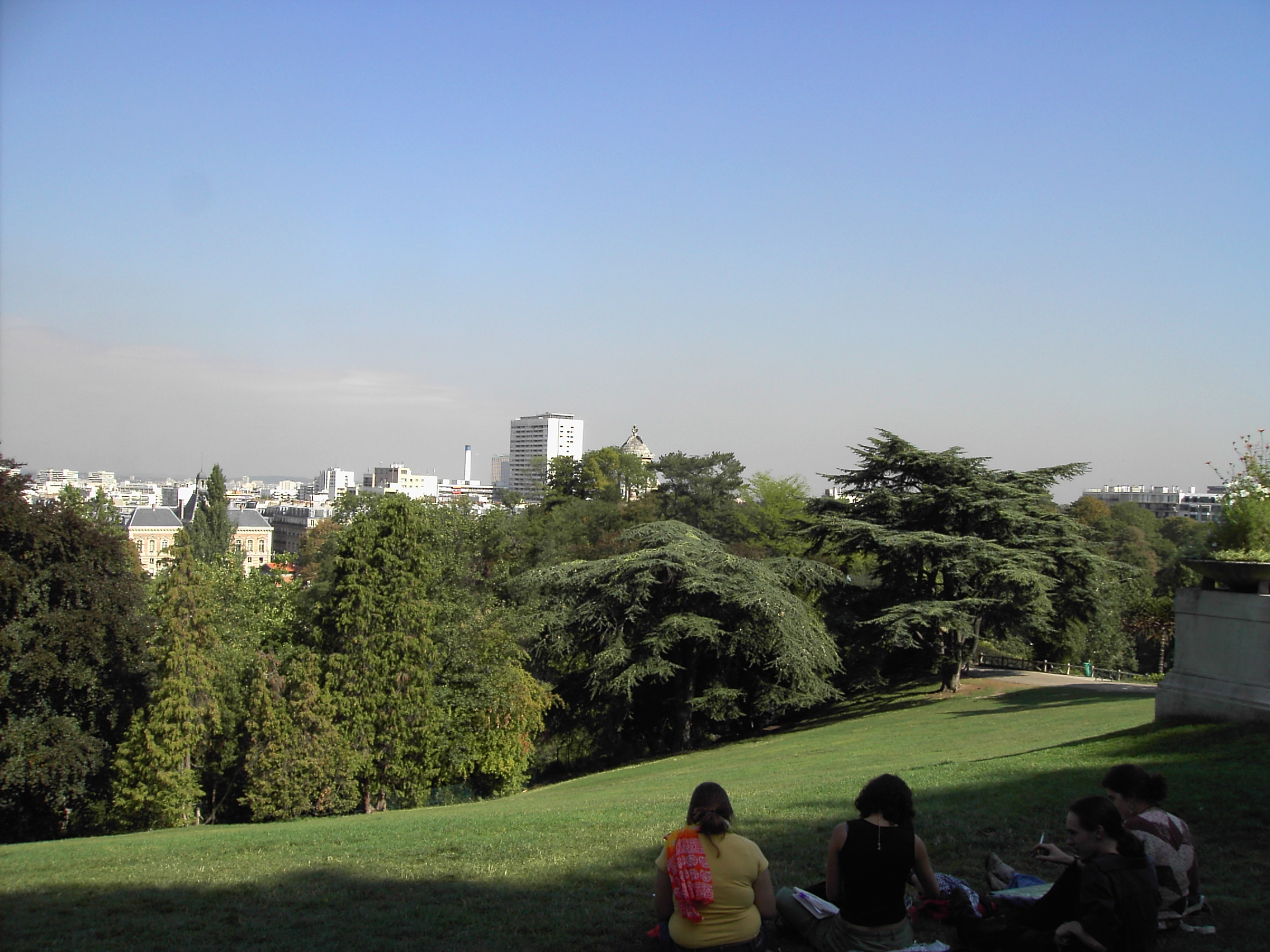 Paris, Buttes Chaumont, sept. 2005 by Lalupa